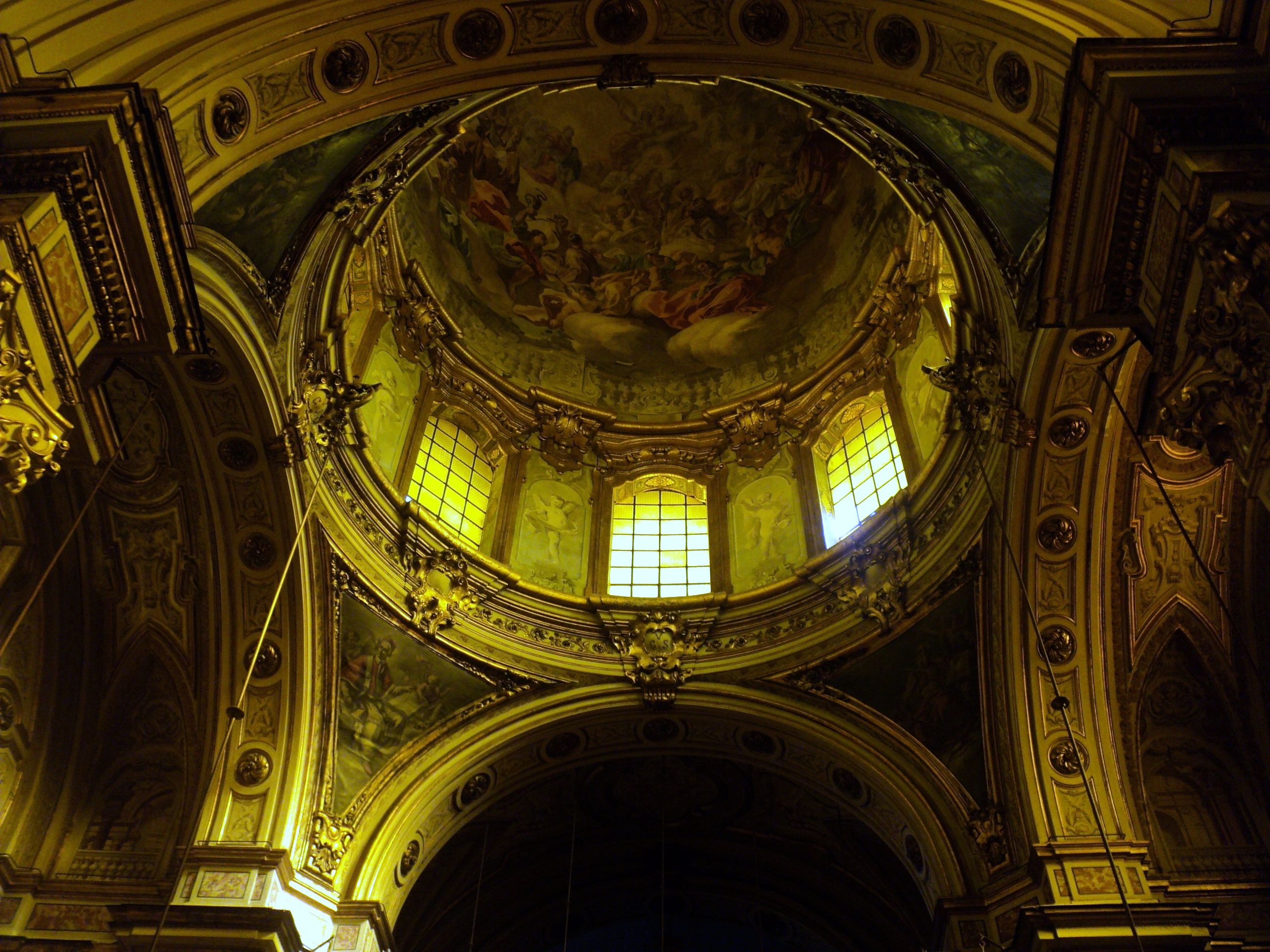 Chiesa di San Giuseppe dei Ruffi (Napoli)